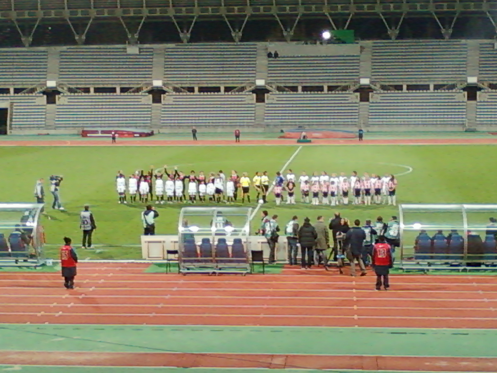 Présentation des équipes lors du match Paris SG - Francfort du 09 novembre 2011 au stade Charléty